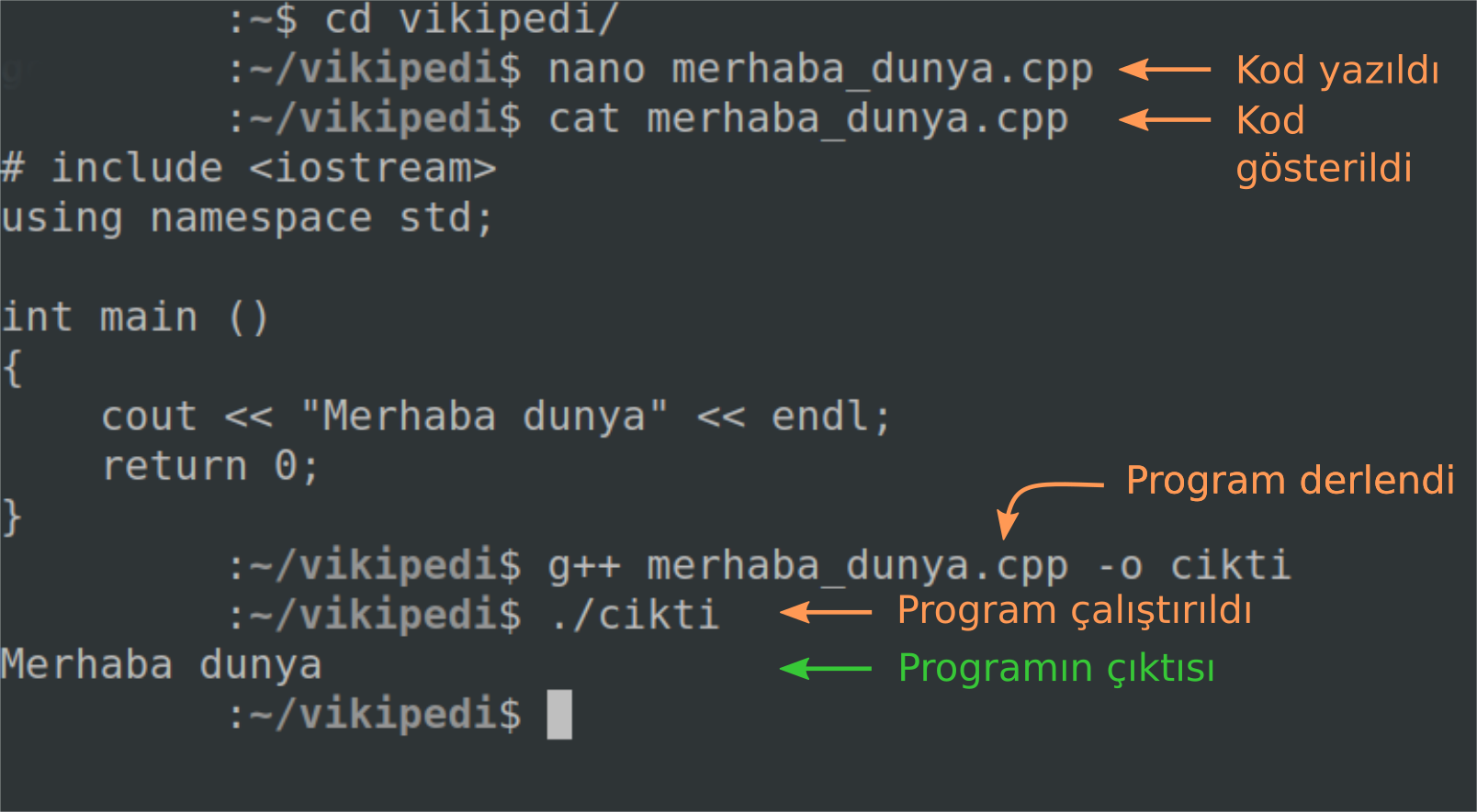 Merhaba dunya C++ programın terminal çıktısı. Linux sisteminde g++ derleyicisi kullanıldı.